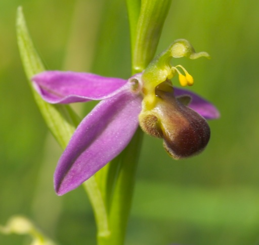 Ophrys apifera var. bicolor, le 6 juin 2004, Dourdan la Foret